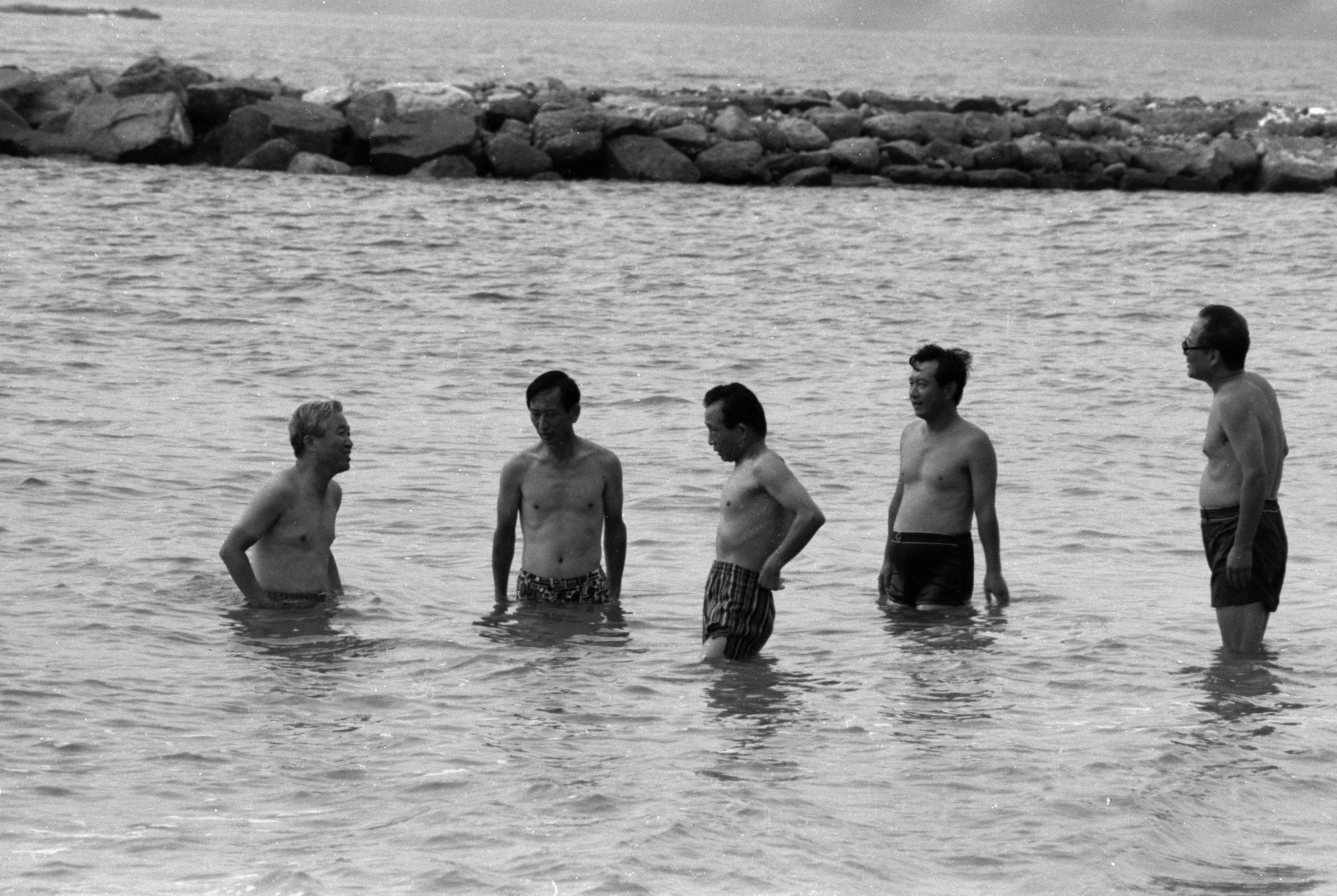 촬영장소 : 대한민국 저도 참석자 : 박정희 대통령 인물상세정보 : 박정희 대통령(중앙) , 미상(좌 우)